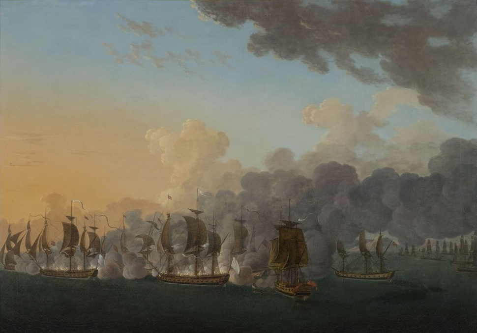 Combat naval à la hauteur de Louisbourg, le 21 juillet 1781. Le 21 juillet 1781, les frégates françaises de 32 canons l’Astrée et l’Hermione, commandées respectivement par Lapérouse et Latouche-Tréville, rencontrent cinq bâtiments anglais, au large des côtes d'Amérique du Nord. Après quelques heures de combat, le HMS Jack a descendu son pavillon et le HMS Charlestown est démâté de son grand mât de hune. Profitant de l'obscurité à la nuit tombante ce dernier s'éclipse, laissant sur place les deux frégates françaises. Guerre d'Indépendance américaine. Peinture à l'huile. H. 116 cm, l. 163 cm, H. 142 cm, l. 187 cm (cadre), H. 188 cm (cadre + cartouche).